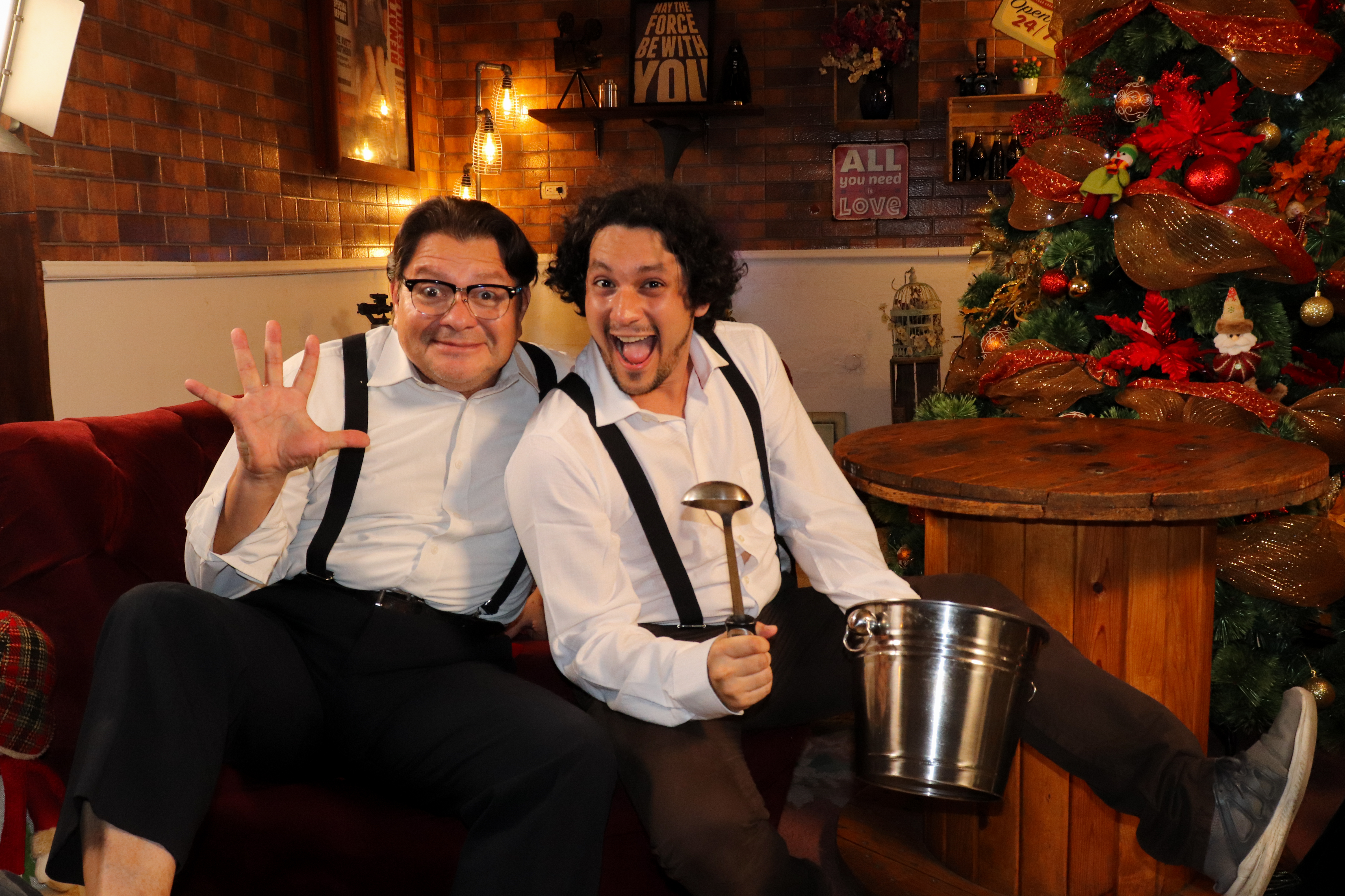 Marcelo Gálvez y Felipe Crespo en la obra Théâtre à la carte en 2019.